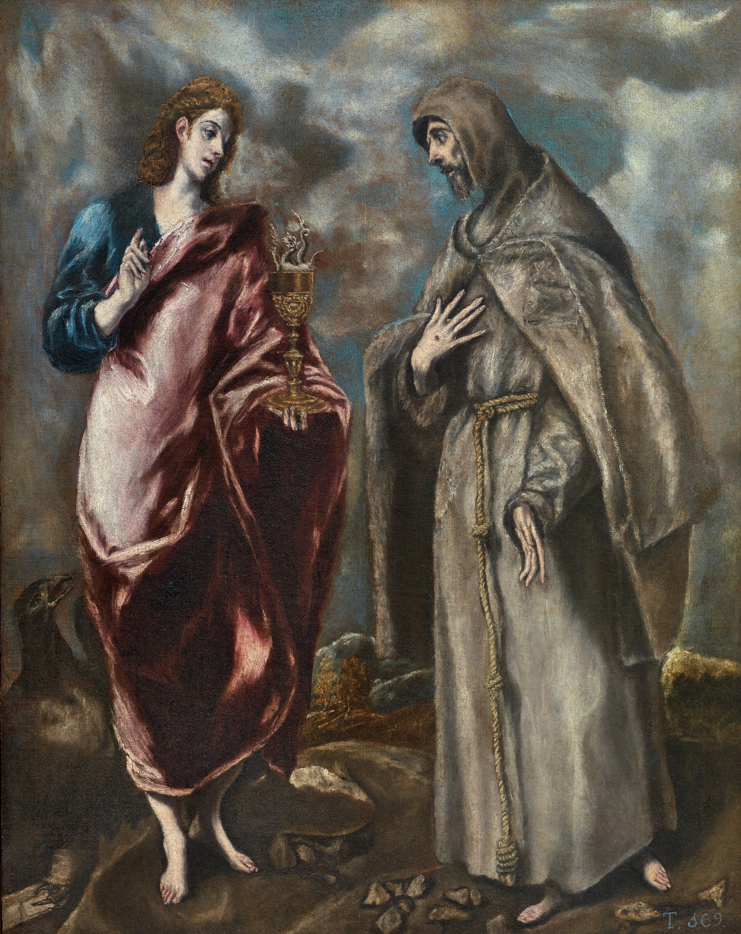 La obra representa a San Juan Evangelista junto a San Francisco de Asís, fundador de la Orden de los franciscanos.